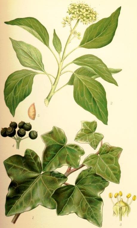 Murgröna (Hedera helix) vegetativt skott, blomskott med blomflockar och blad, blomma (3/1), fruktställning (naturl. storlek), frö (3/1).